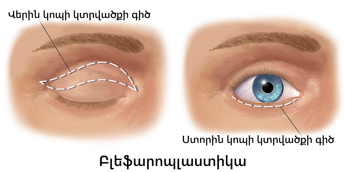 Բլեֆարոպլաստիկա